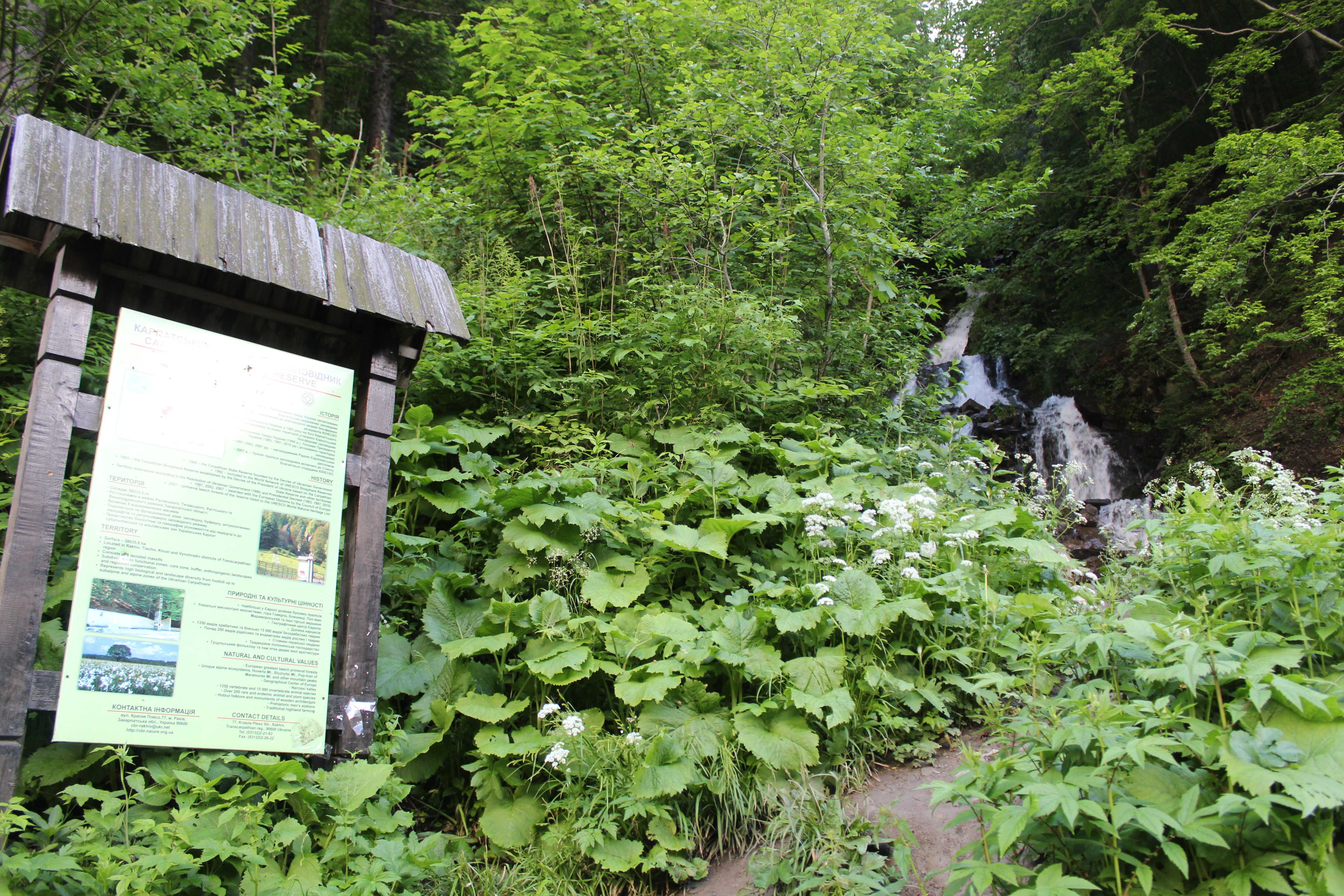 Труфанець. Водоспад. Карпатський біосферний заповідник. Вікіекспедиція. 2019